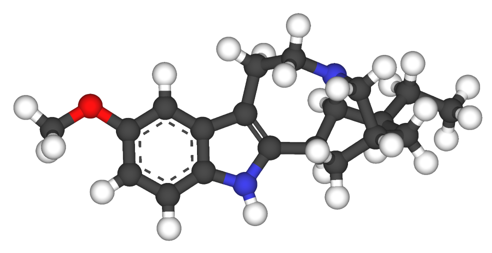 Ibogaine